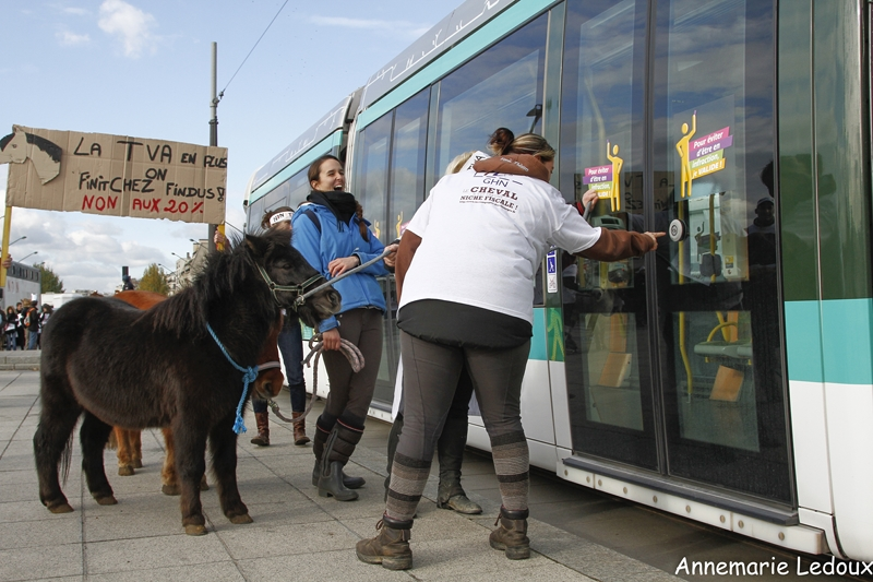 Photographie prise lors de la manifestation anti Equitaxe du 19/11/2013 à Paris